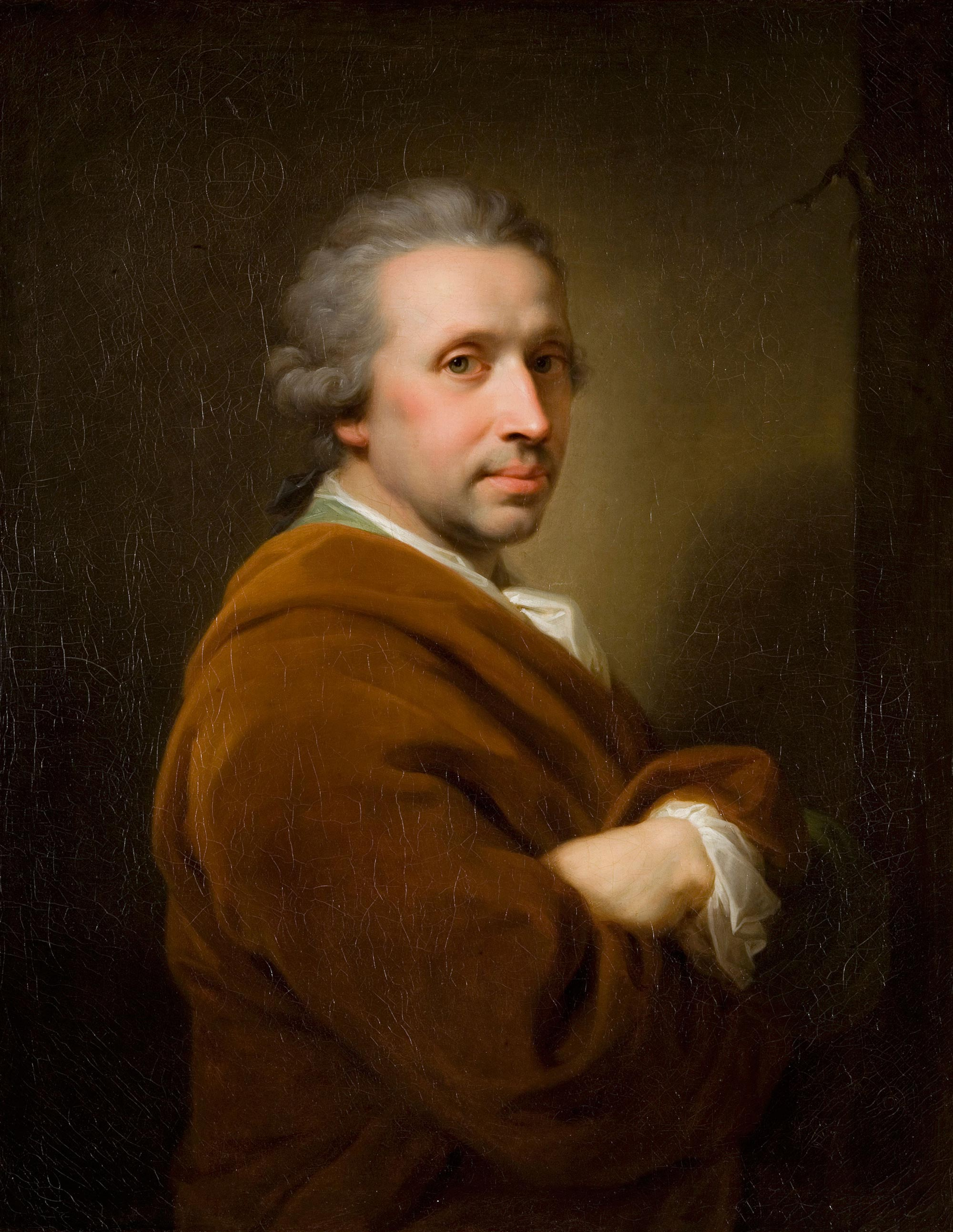 Belarusian (Taraškievica orthography): Партрэт Уладзіслава Гуроўскага (Uładzisłaŭ Guroŭski)title QS:P1476,be-tarask:"Партрэт Уладзіслава Гуроўскага (Uładzisłaŭ Guroŭski)" label QS:Lbe-tarask,"Партрэт Уладзіслава Гуроўскага (Uładzisłaŭ Guroŭski)" label QS:Lpl,"Władysław Gurowski"